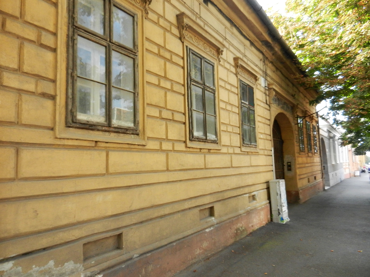 Casa monument istoric (Lunga 139)